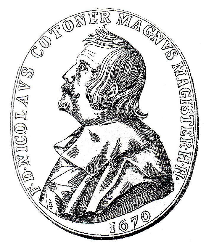 Nicolau Cotoner (1608-1680), Gran Mestre de l'orde de Sant Joan de Jerusalem.